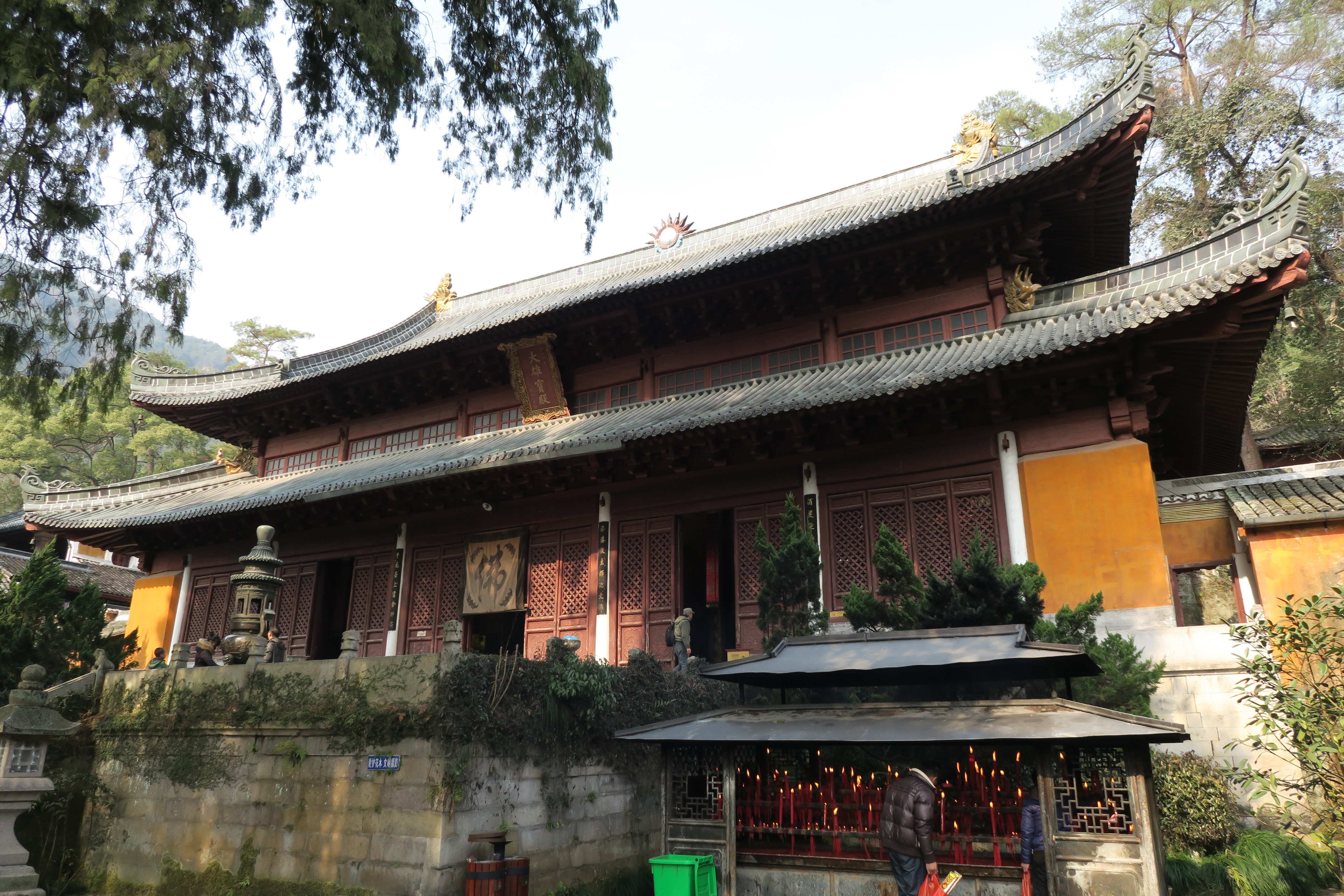 天台山国清寺